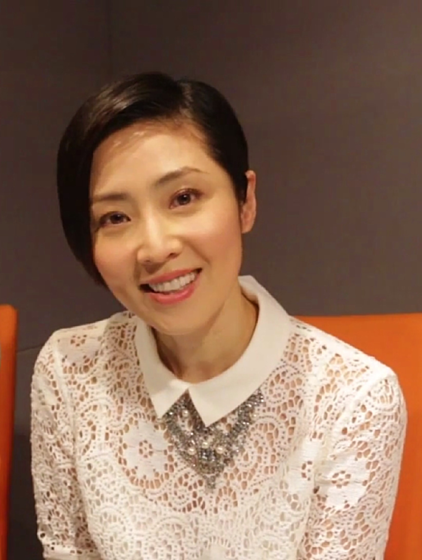 中文（香港）: 前修身堂控股有限公司主席